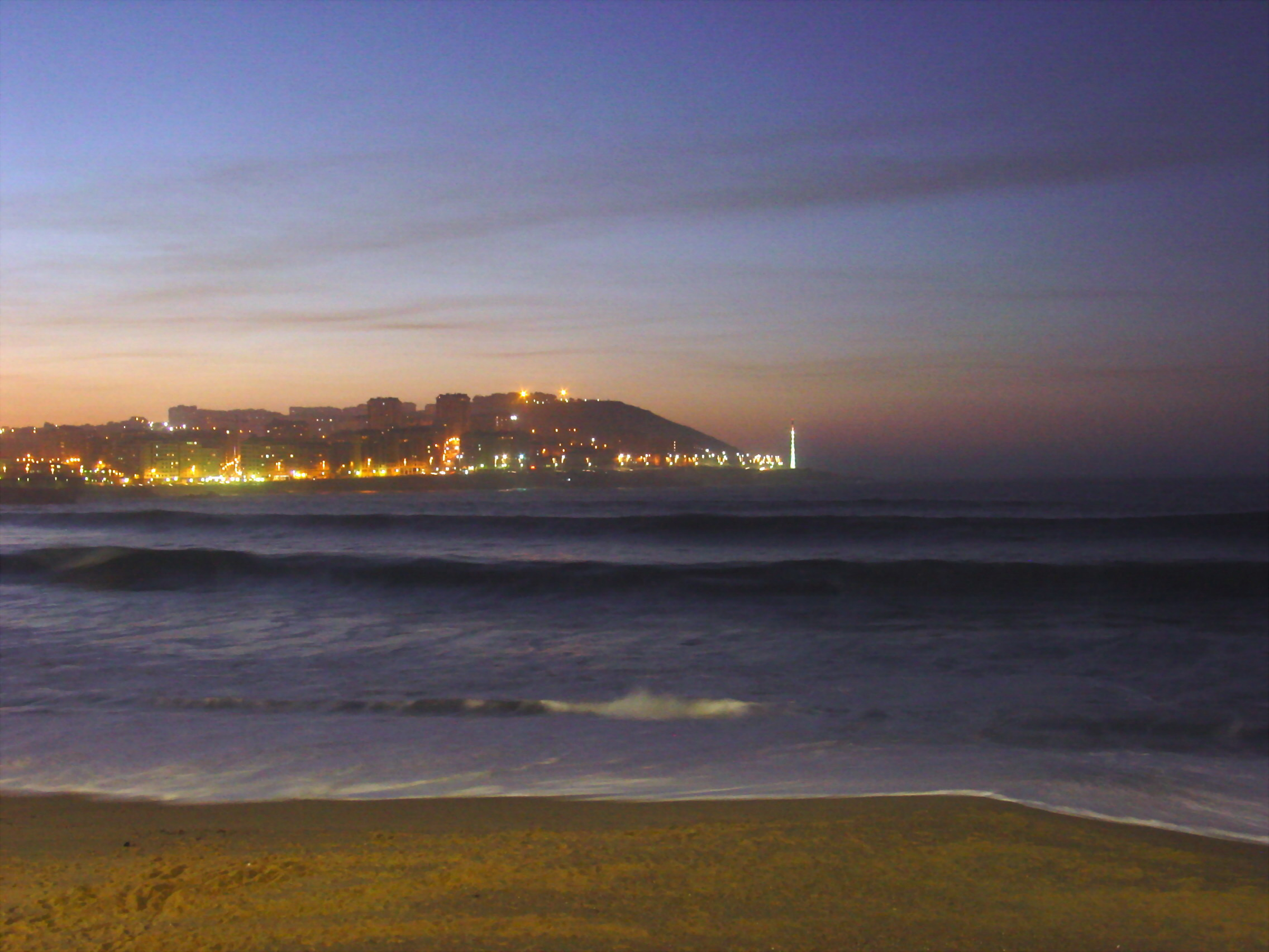 self made